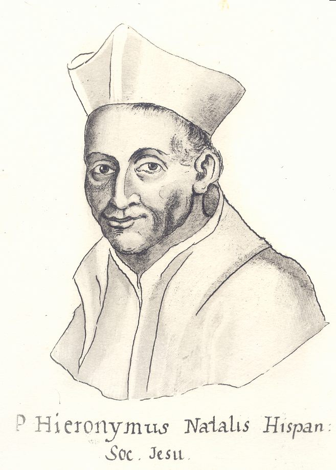 Ancienne gravure de Jérome Nadal, jésuite espagnol du XVIe siècle